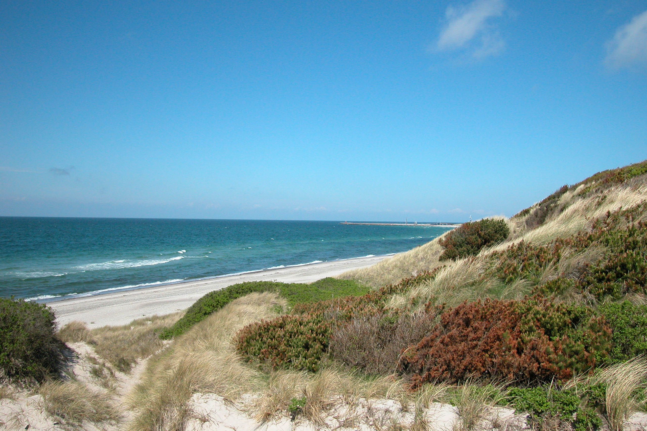 Anholt Strand (an der Westseite der Insel, südlich des Hafens). Aufgenommen im Mai 2005.